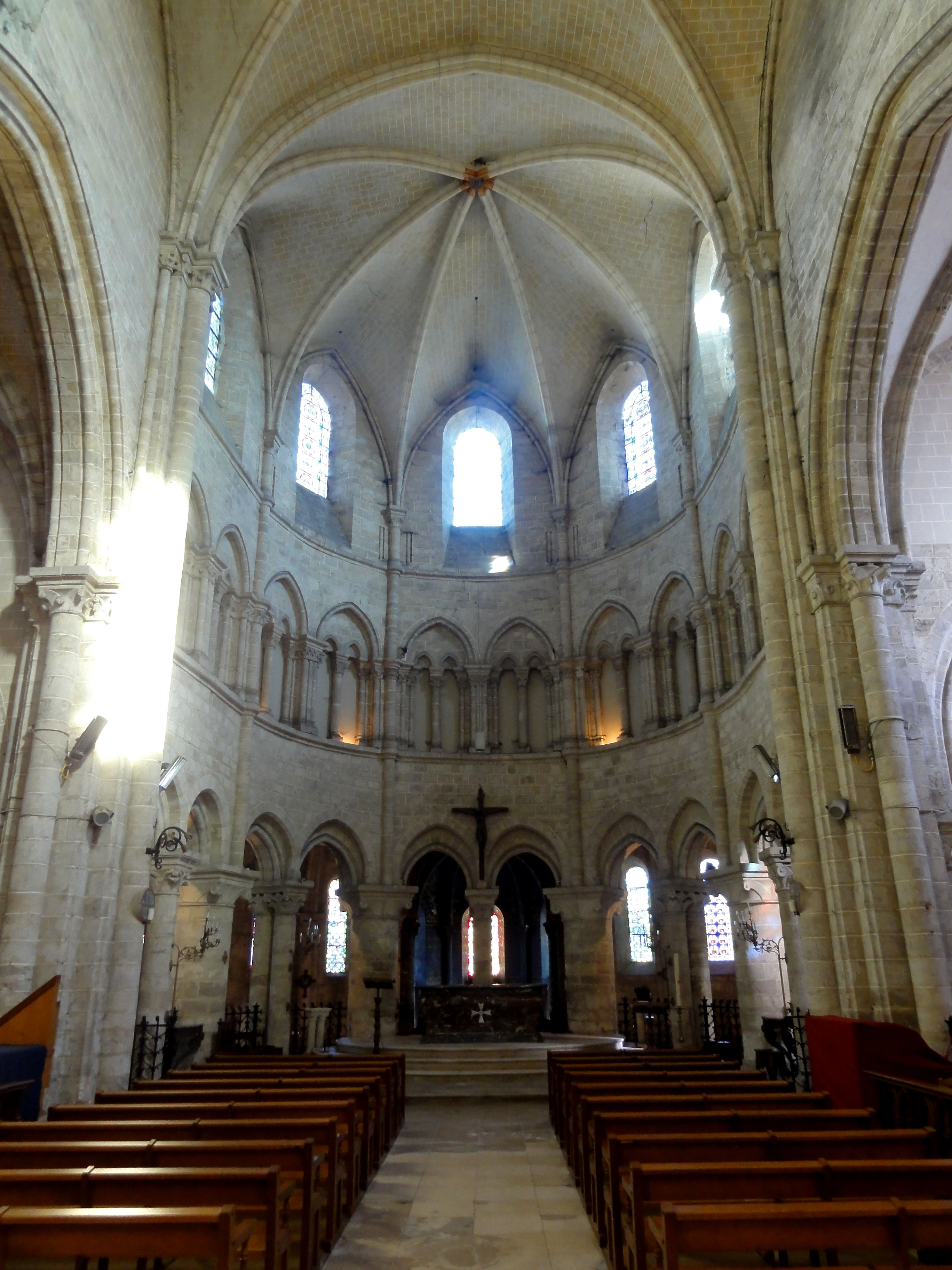 Croisée, vue vers l'est.